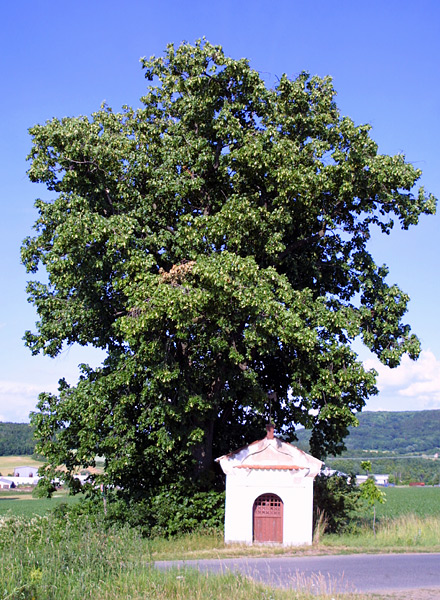 Chudenická lípa u silnice z Chudenic do Slatiny.